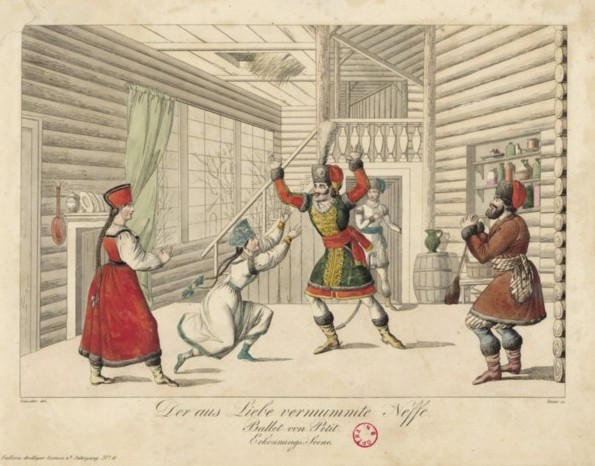 Der aus Liebe vermummte Neffe, ballet de Baptiste Petit. Musique d'Adalbert Gyrowetz (Vienne, Kärnthnerthor Theater, février 1827) – Zinke, Johann Wenzel (1797-1858 ; graveur) d'après un dessin de Schoeller, Johann Christian (1782-1851)